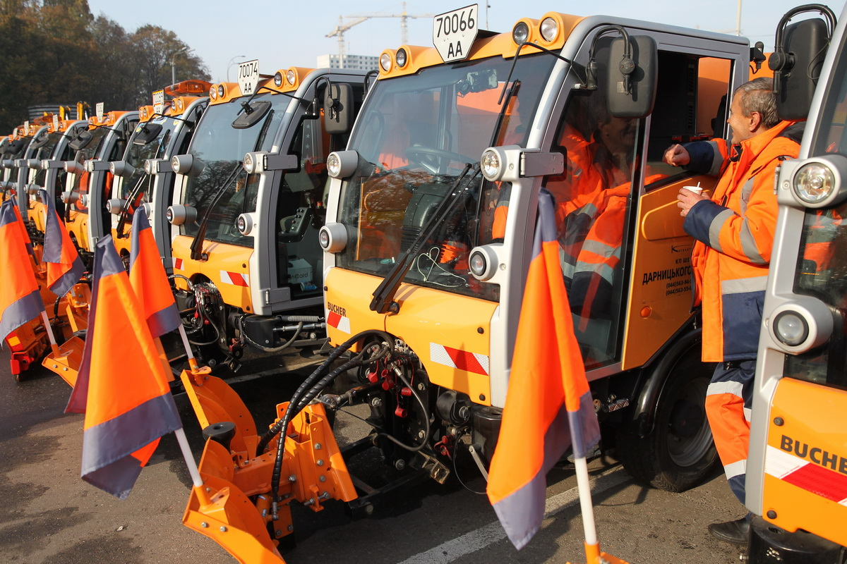 Выставка «Киевавтодора», 2019-10-23